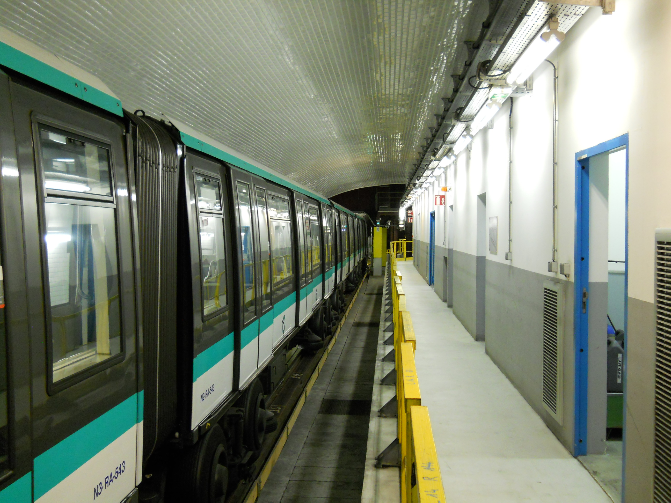 Vue du quai, cette fois en direction de la boucle en elle-même. Pour faciliter la maintenance, la voie ne comporte pas de rail de guidage : le train est guidé grâce aux roues de sécurité.